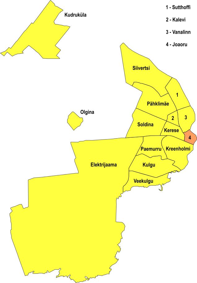 Narva linnaosa Joaoru